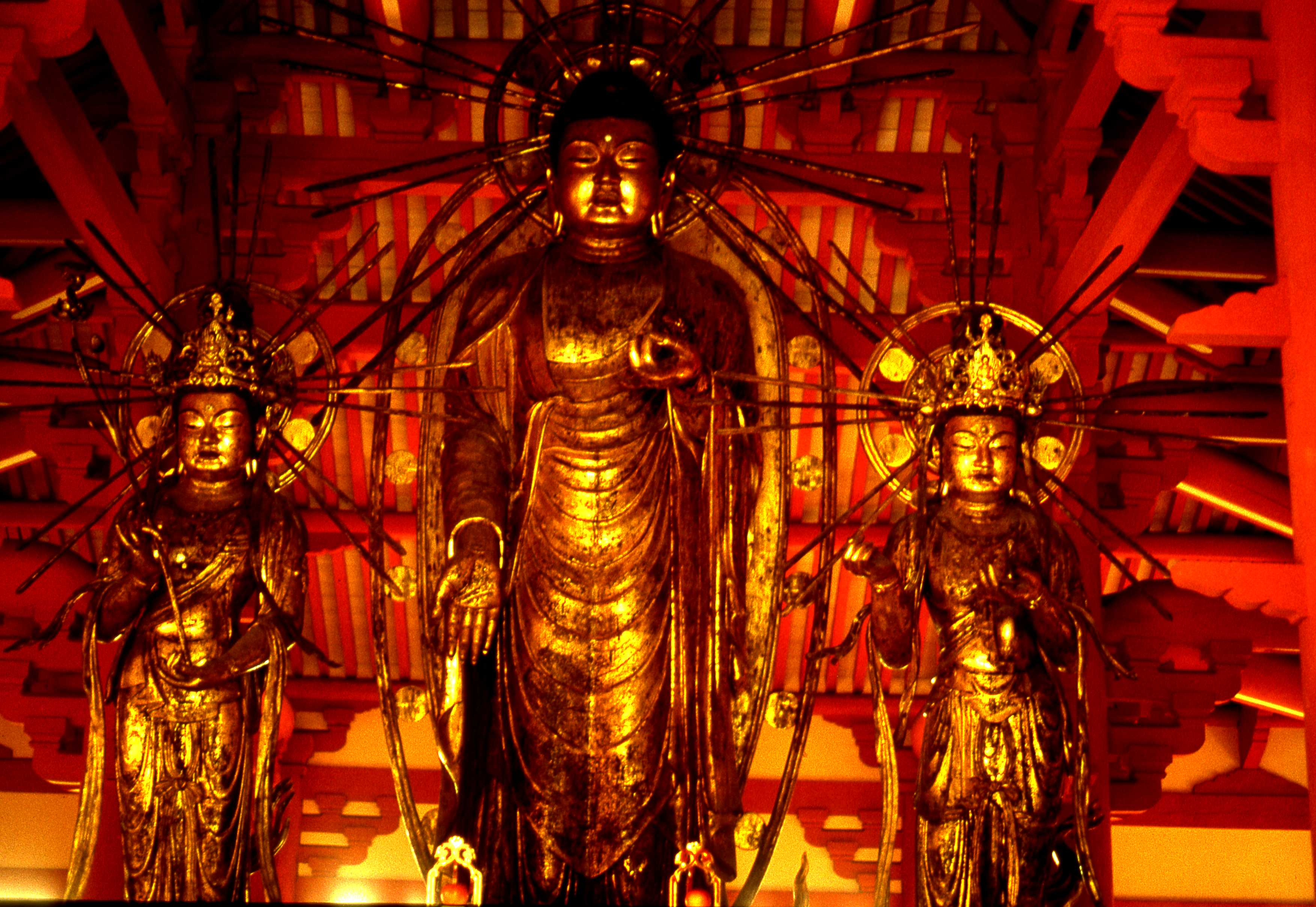 阿弥陀三尊像～この日は本堂扉が開け放たれ、三尊を拝すことが出来た。外部より撮影。通常は拝観料が必要。 ～photo by Autumn Snake 【おぉたむ すねィく探検隊】写真部門 担当 大原佳苗